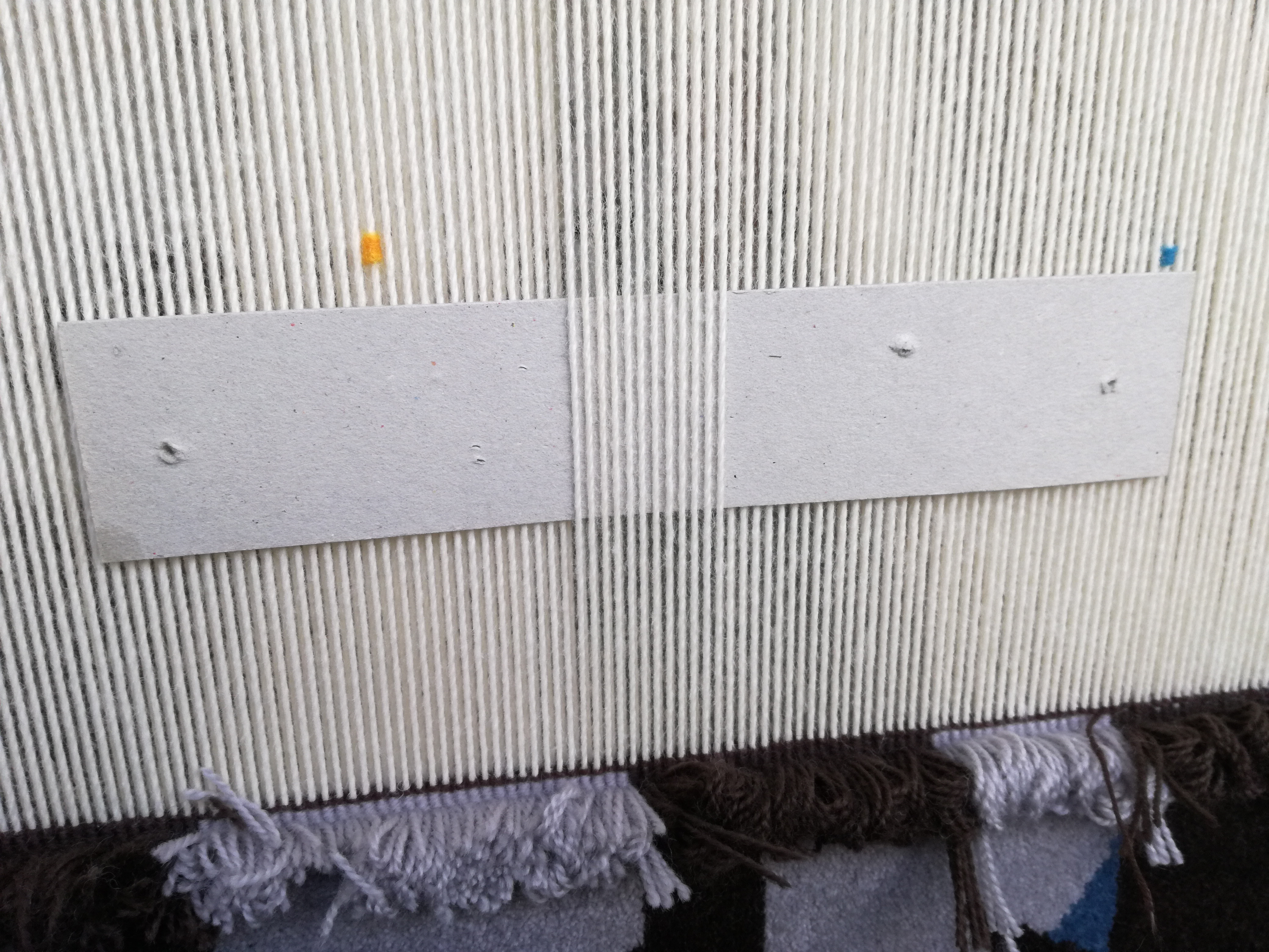 Un carton passé entre les fils de chaîne arrière et afin de dégager une pienne. Une chaine se compose de plusieurs piennes. A la Manufacture de la Savonnerie, une pienne représente une section de chaîne de 10 cm de large.